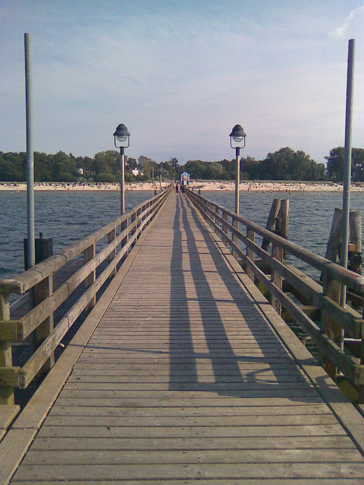 Seebrücke Lubmin, landwärts